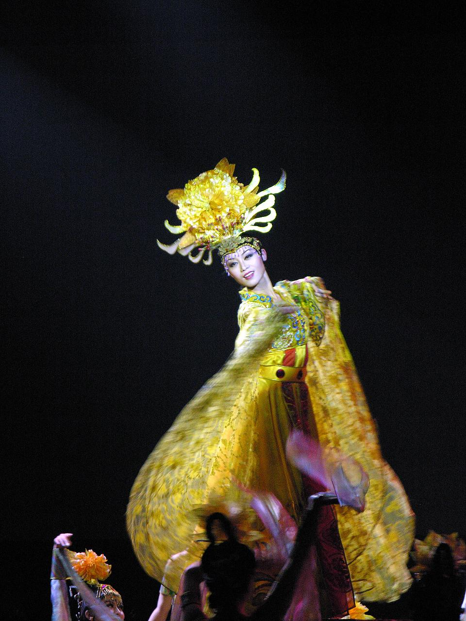 China-7322